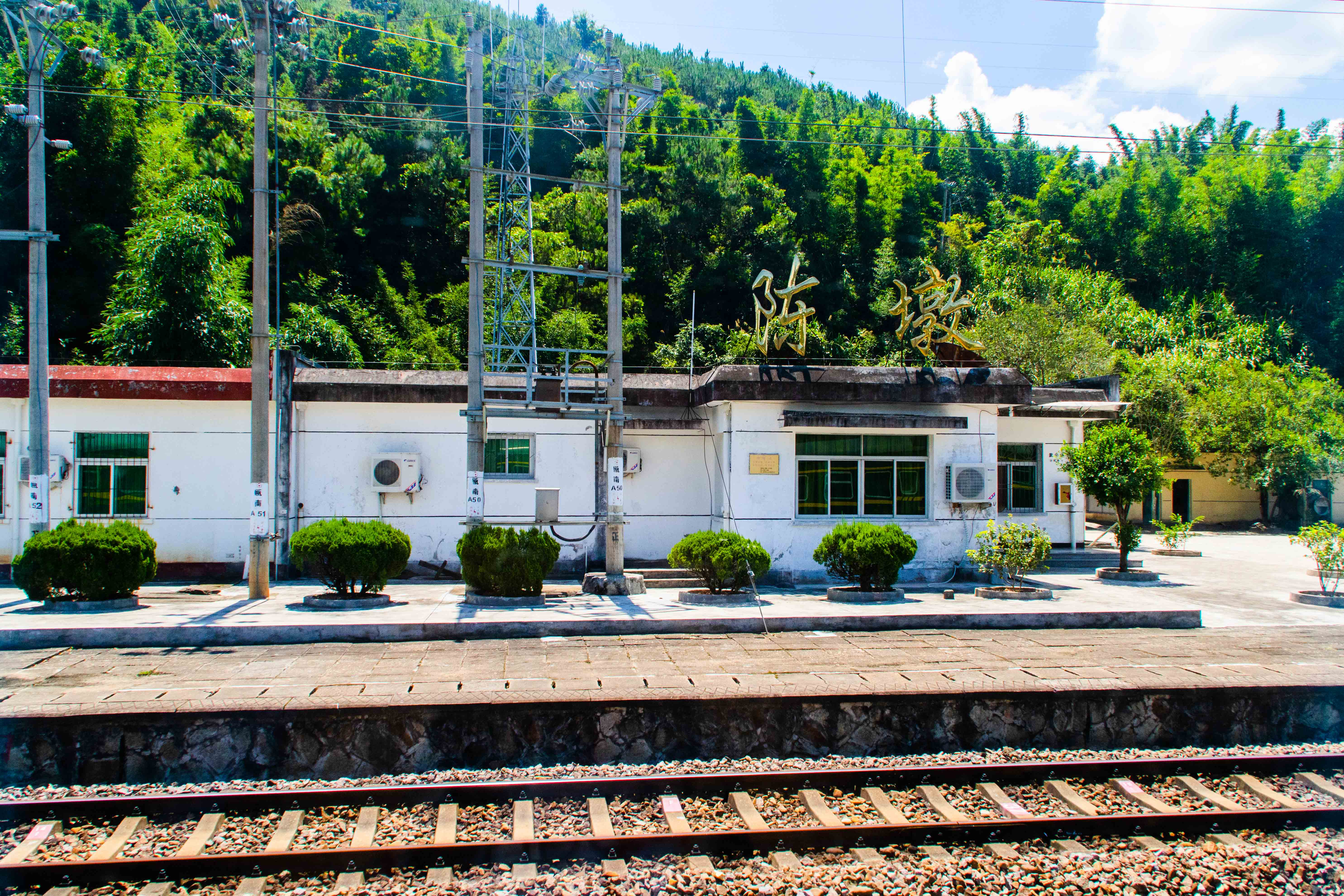 陈墩站站房